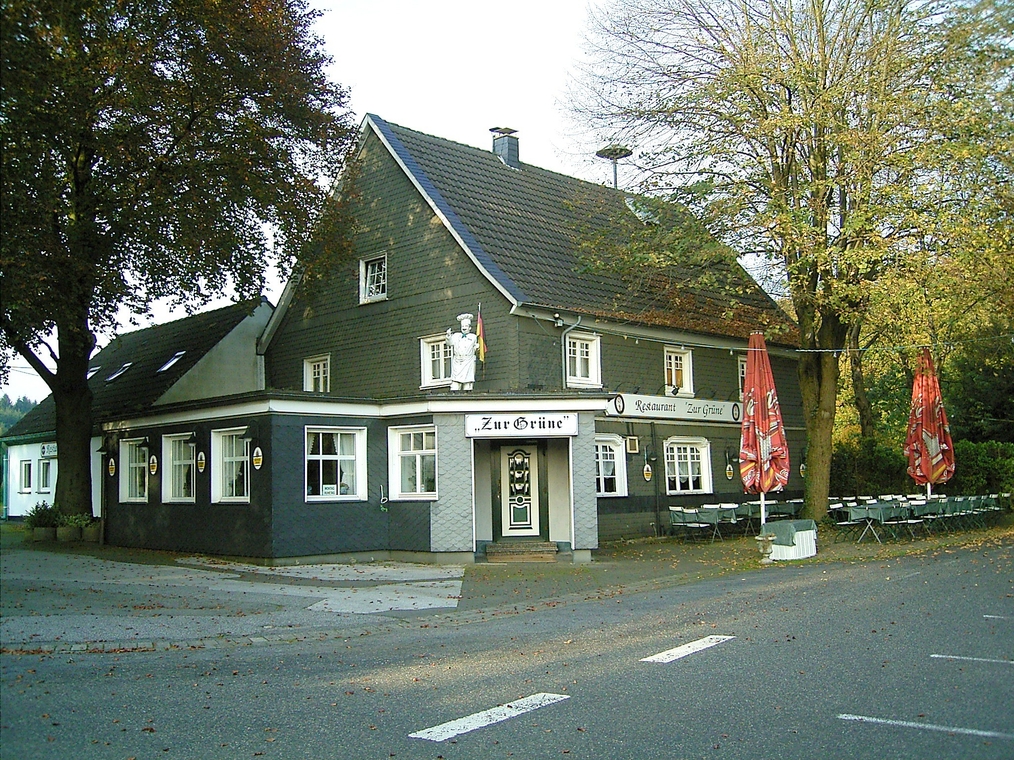 Radevormwald